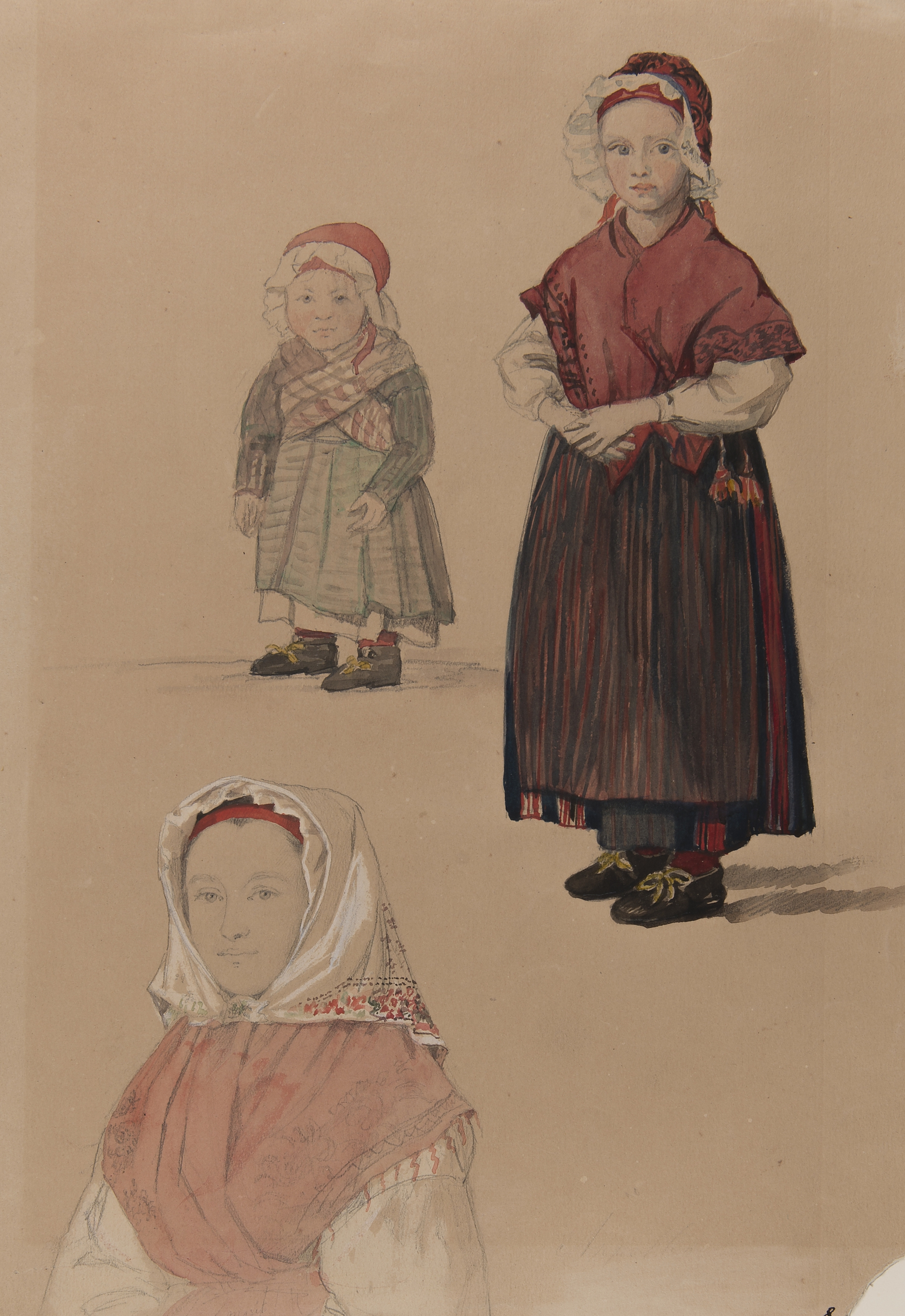 Tre bilder på barn i dräkt. Akvarell av P.Södermark. Depicted place: Q10725987 (Q10725987)